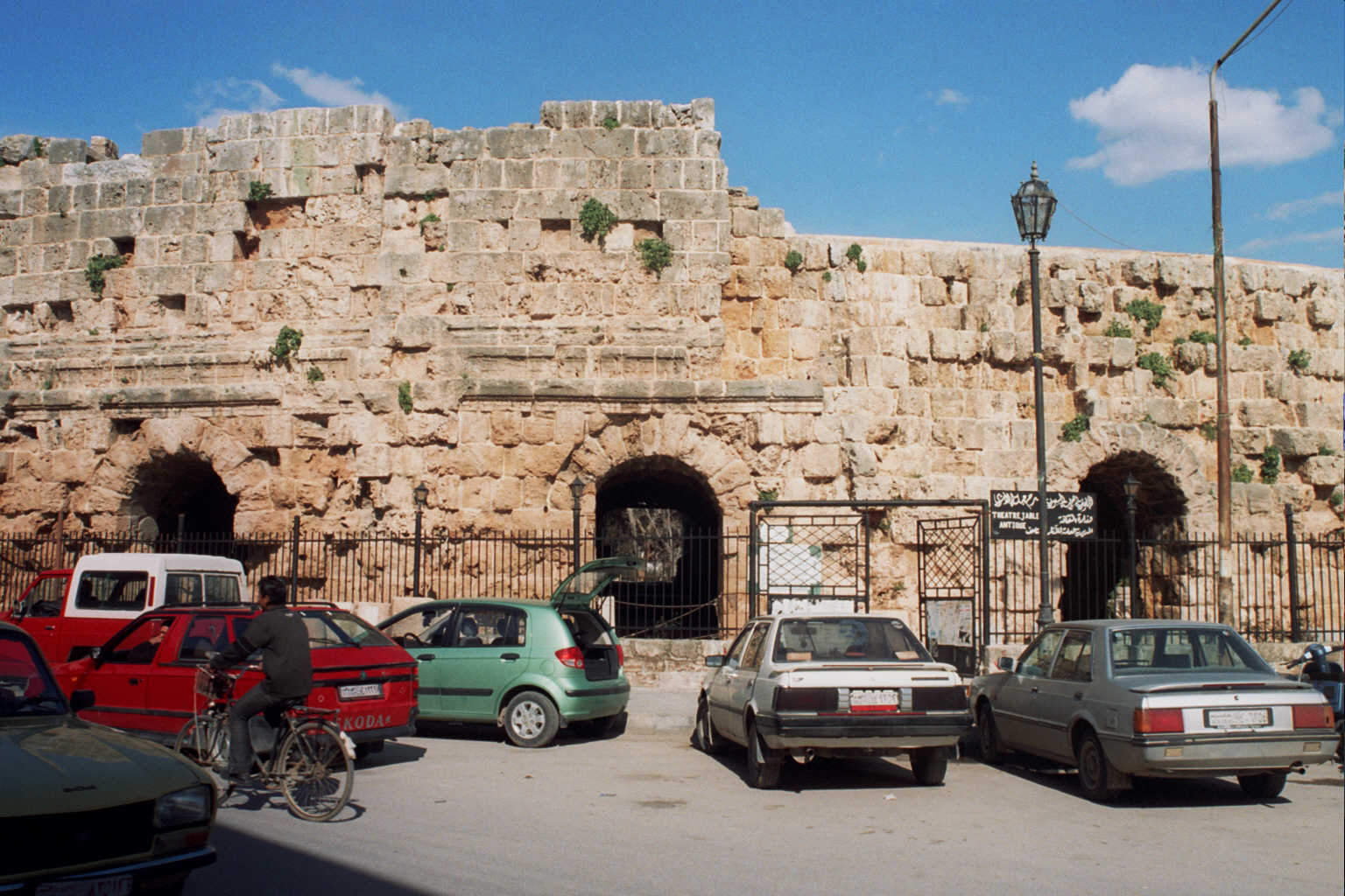 Loris - Teatro Jableh - 2005